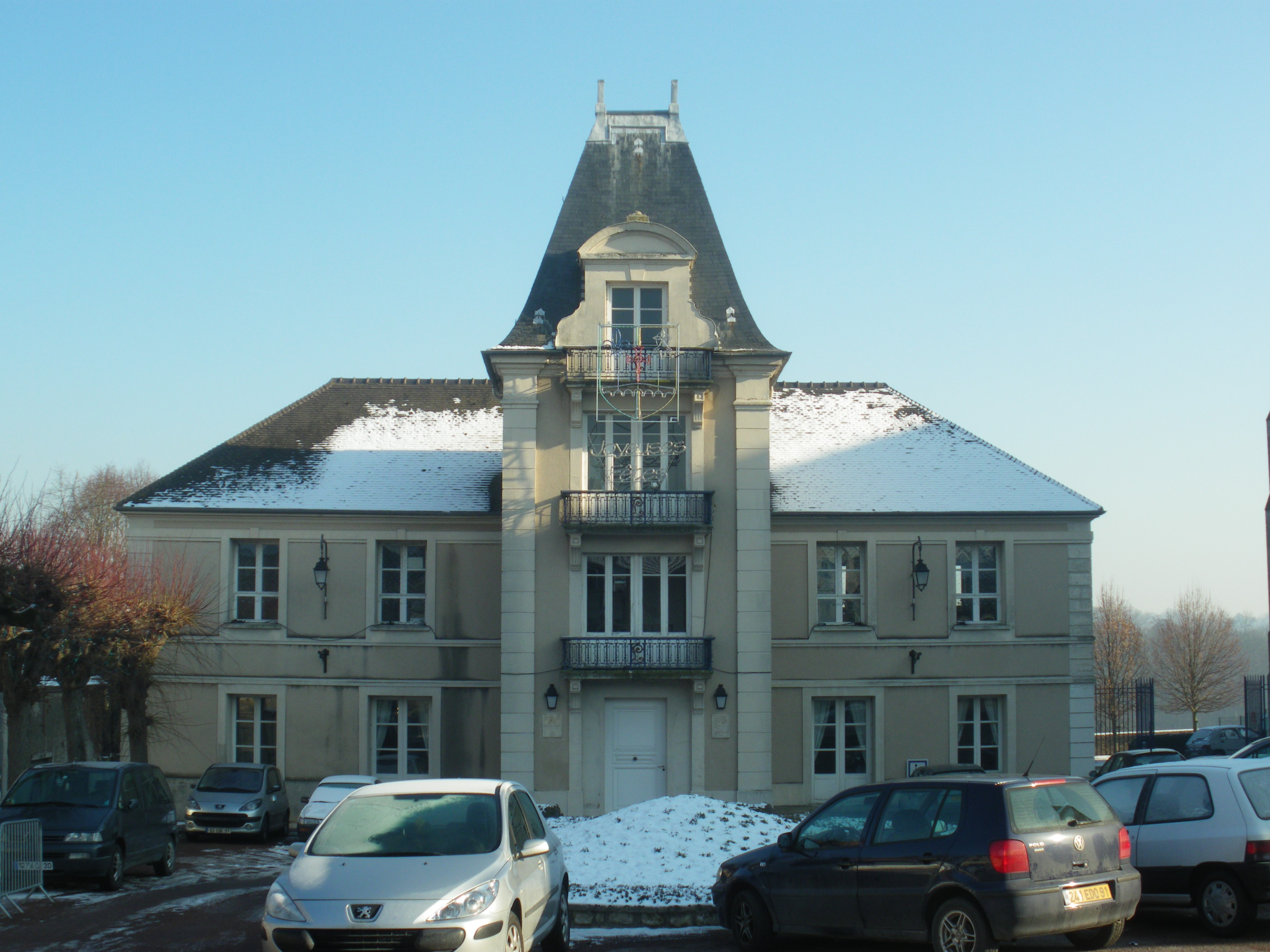 Mairie de Longpont sur Orge